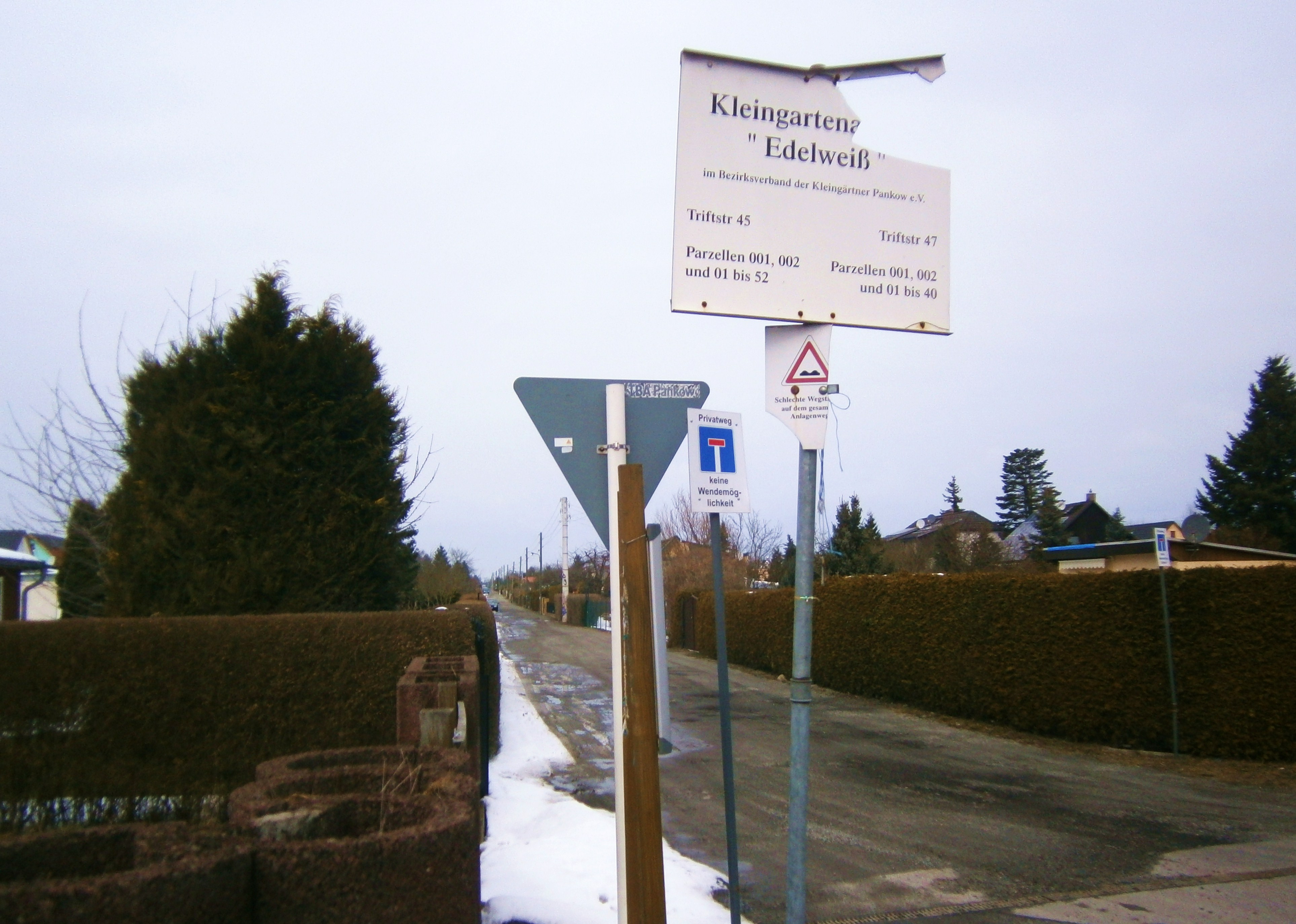 KGA Edelweiß: Trifstraße (quer West) ist eine Straße im Ortsteil Berlin-Französisch Buchholz (hier in Blickrichtung: Nord2)